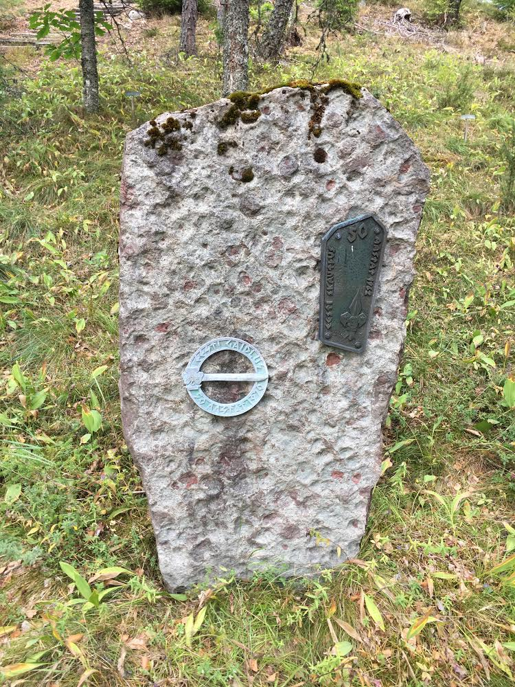 Mälestuskivi tähistab Eesti skautluse ja gaidluse 50. aastapäeva. Kivi on pärit Västgöta marmori kivimurrust. Kivi autor on Edvin Broberg. Kivi koopia viidi Kanadasse Kotkajärvel toimuvale esimesele pagulasskautluse maailmalaagrisse. Kivi lähedusse istutati 5 tamme.